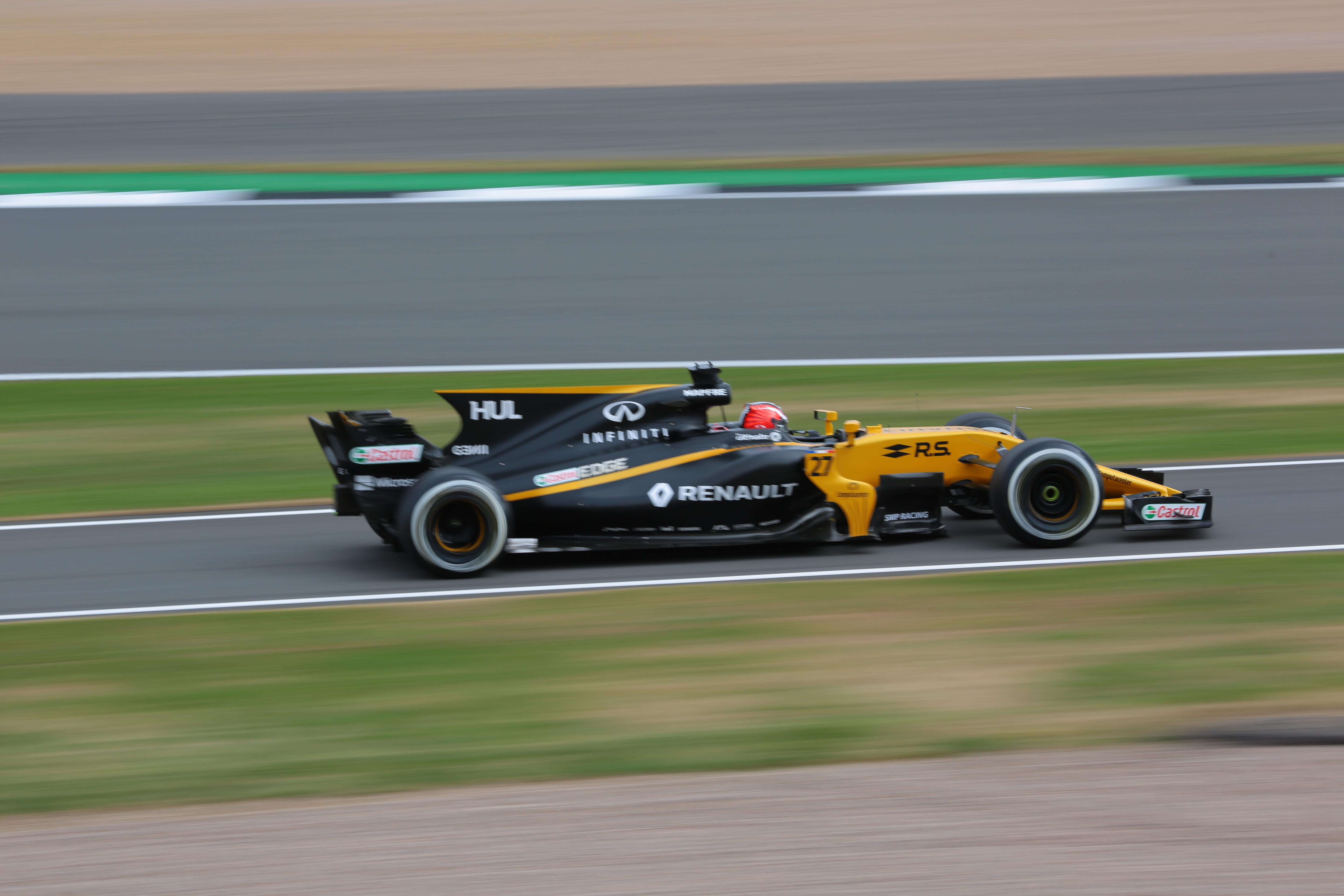 f1